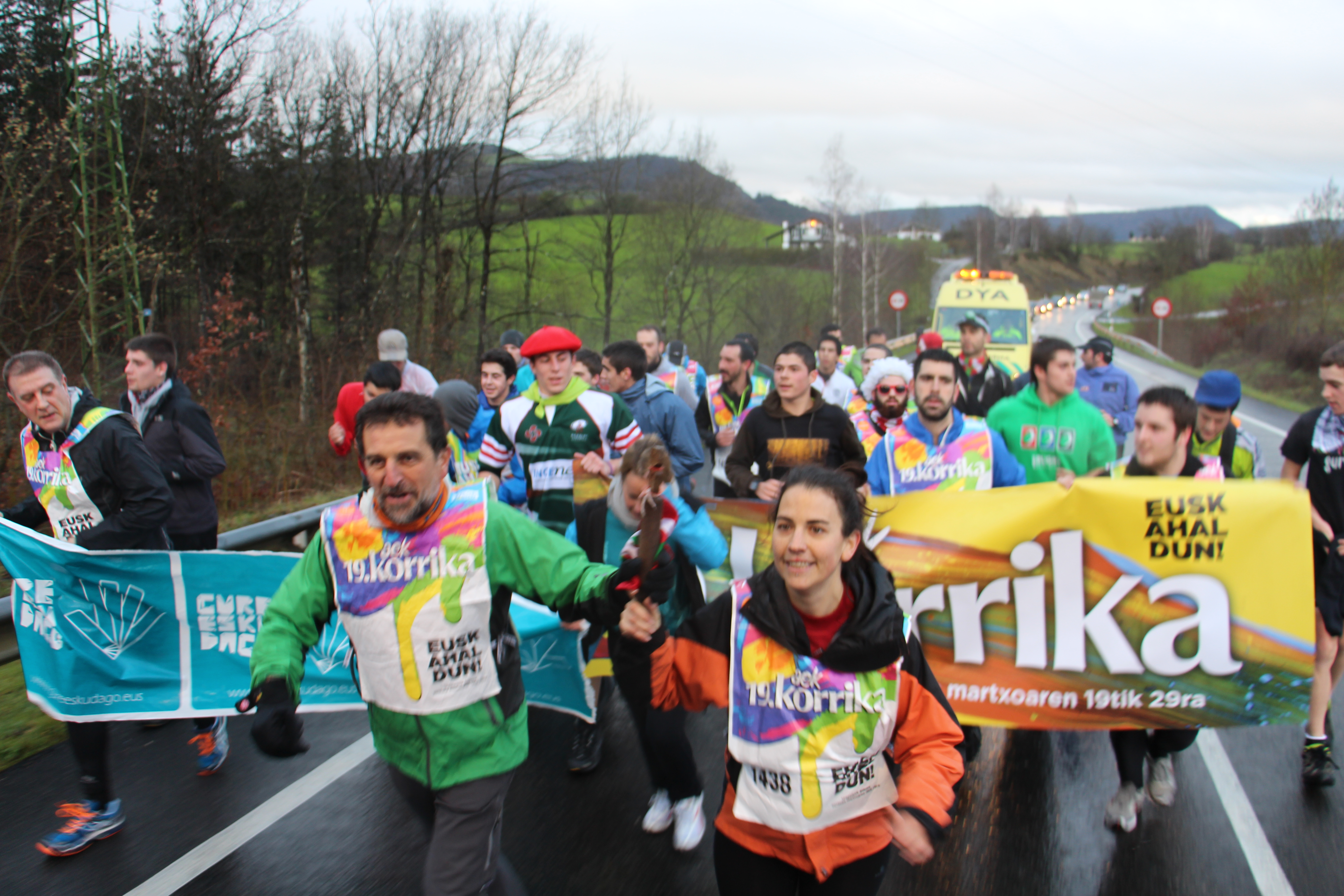 Korrika 2015 Amurrion